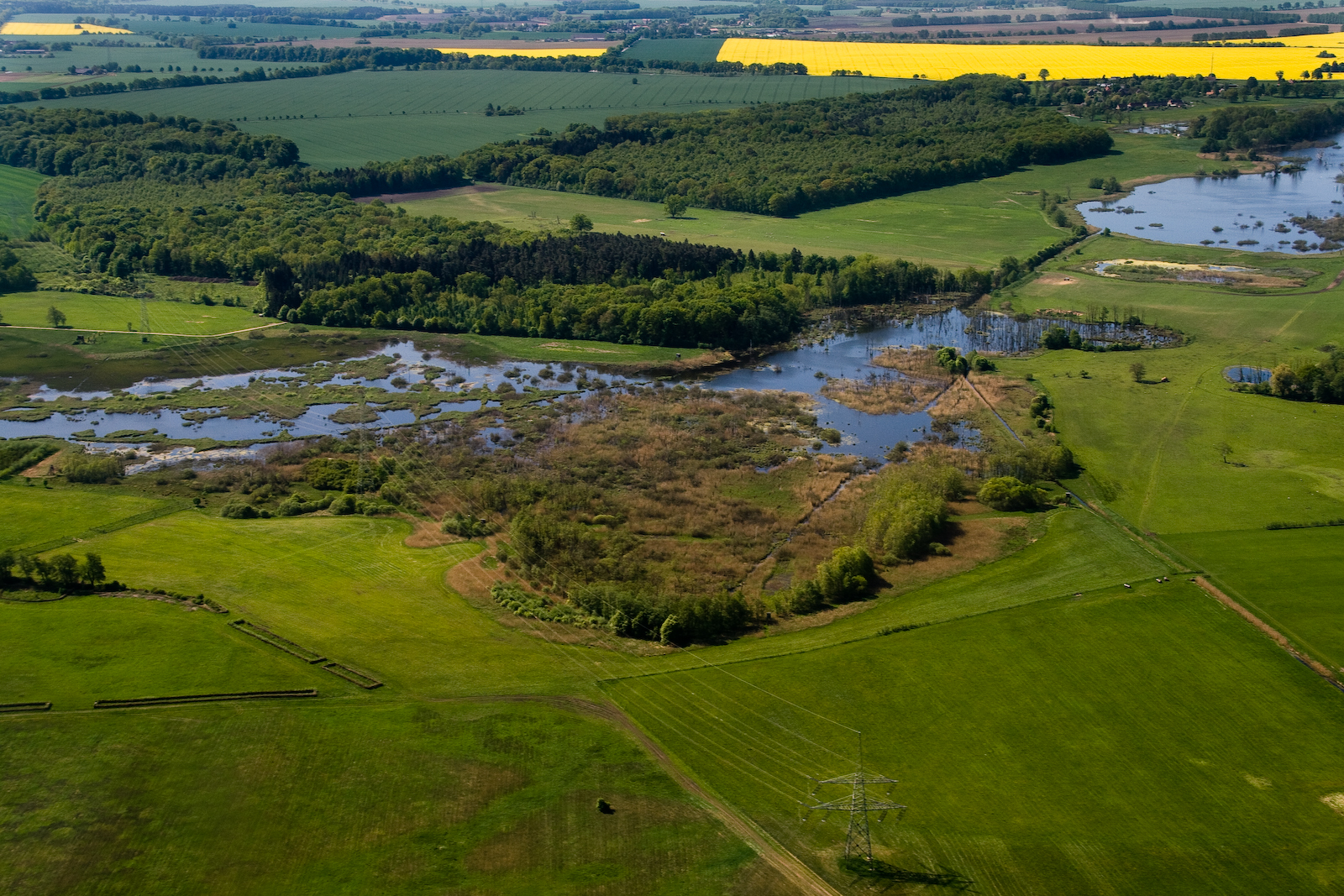 Rogeezer Bruch mit Blick auf einen Teils des Sturer Wiedervernässungsgebiets, Fünfseen, Mecklenburg-Vorpommern, Deutschland.